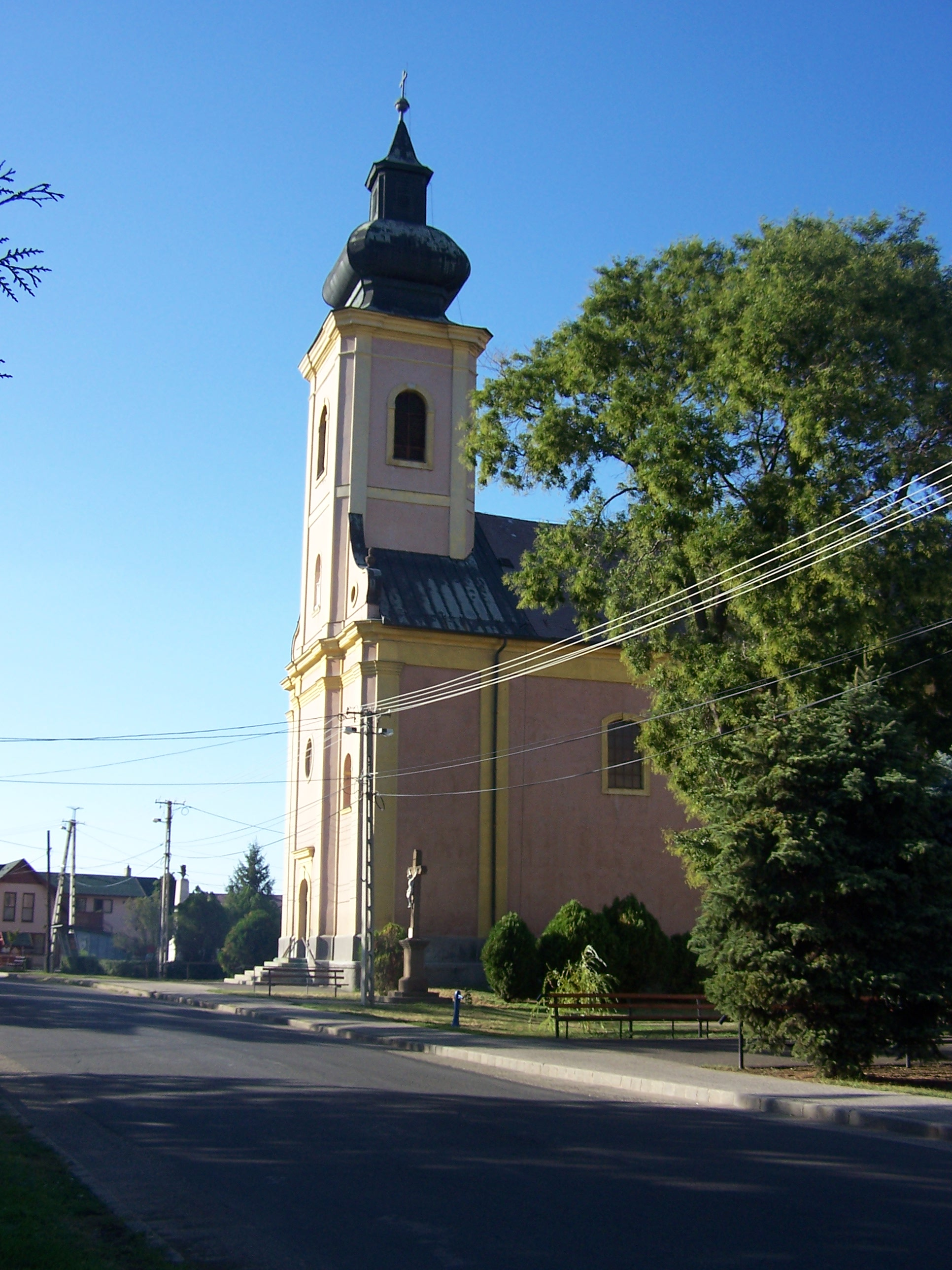 R. k. templom (Szentistván, Széchenyi u. 5.) This is a photo of a monument in Hungary, Identifier: 3196